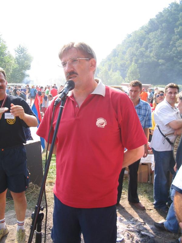 Ненад Манојловић - Дринска Регата 2006.